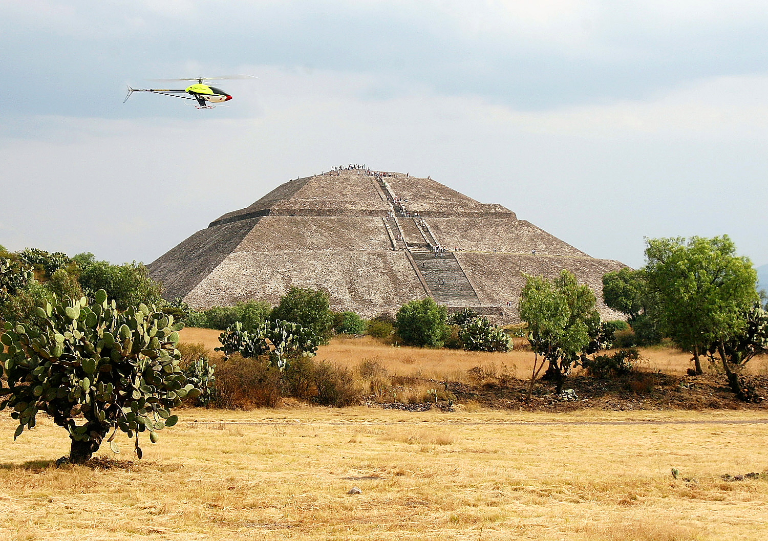 World Scenic Flights in Mexico- World Scenic Flights vor der Sonnenpyramide von Teotihuacán (Mexiko)